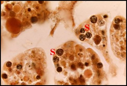 Sphérites de Telema au microscope photonique